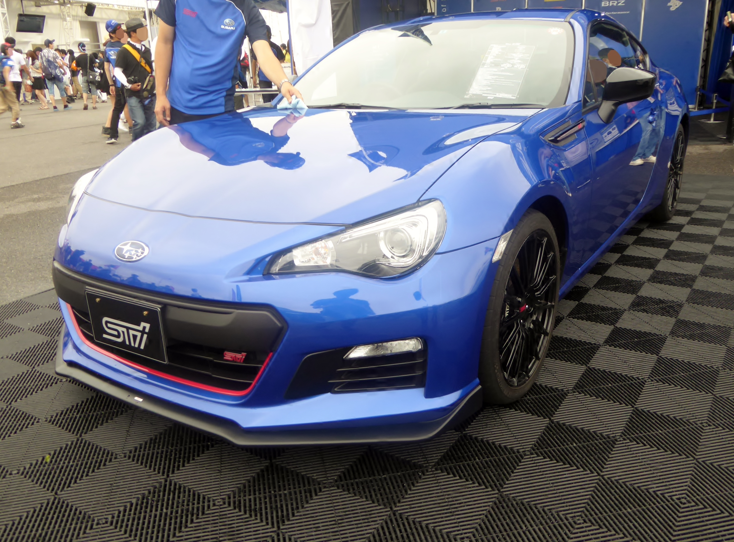 ZC6型スバル・BRZ tSをフロントから撮影。